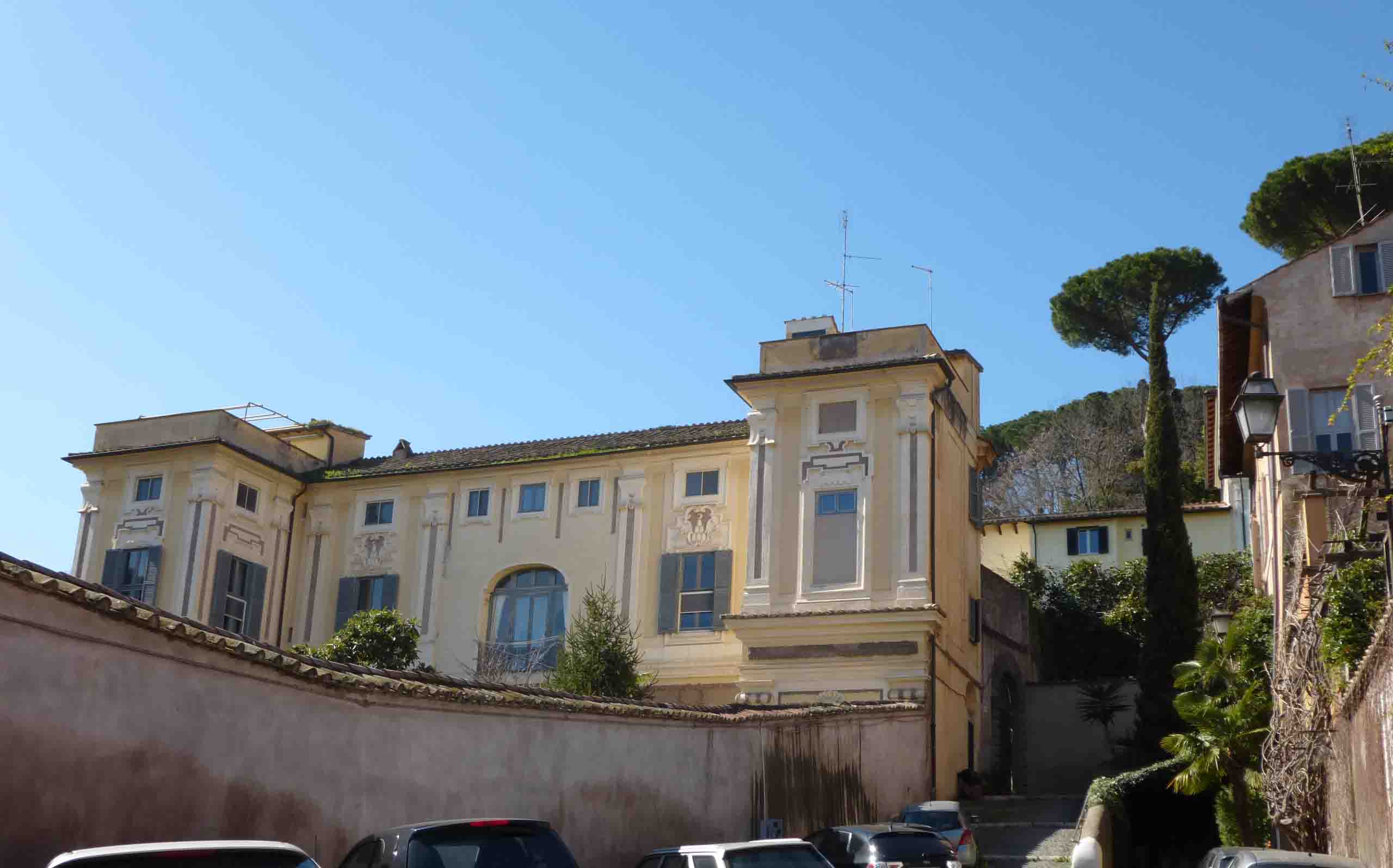 Roma, Trastevere. Via degli Orti d'Alibert. In fondo, la palazzina[1]